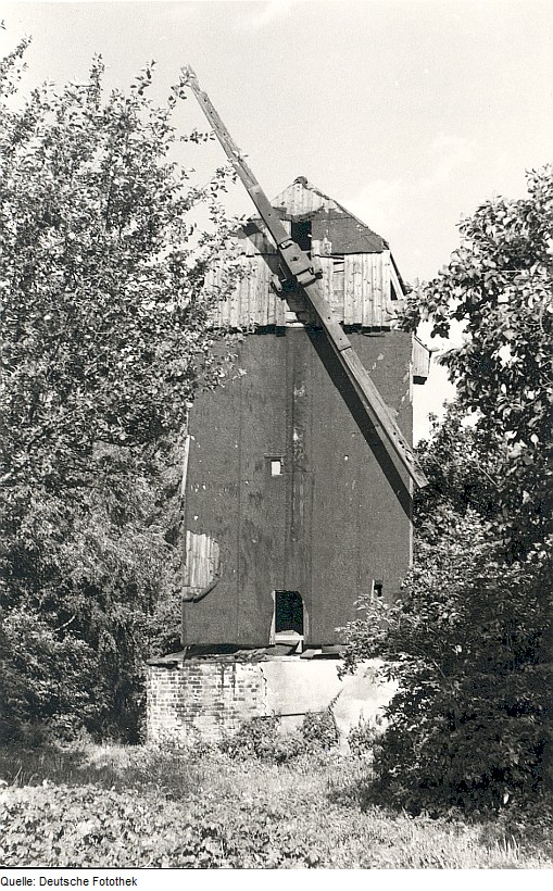 Original image description from the Deutsche FotothekDreileben. Mühle Lauenroth, Baujahr 1860 (2003 demontiert zur Rekonstruktion der Breitfeldschen Mühle in Wulferstedt)